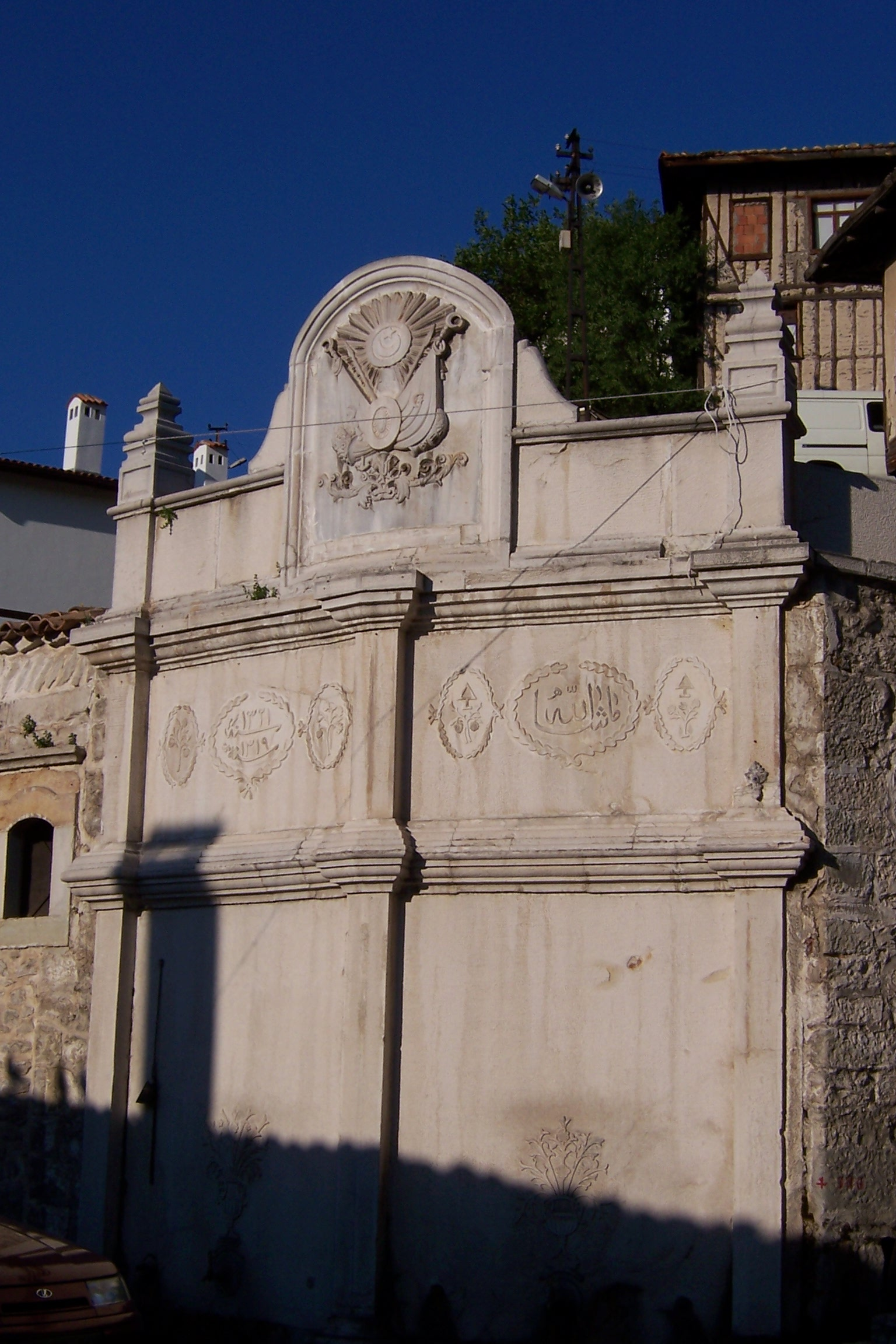 A fountain, Safranbolu, Karabük, Turkey